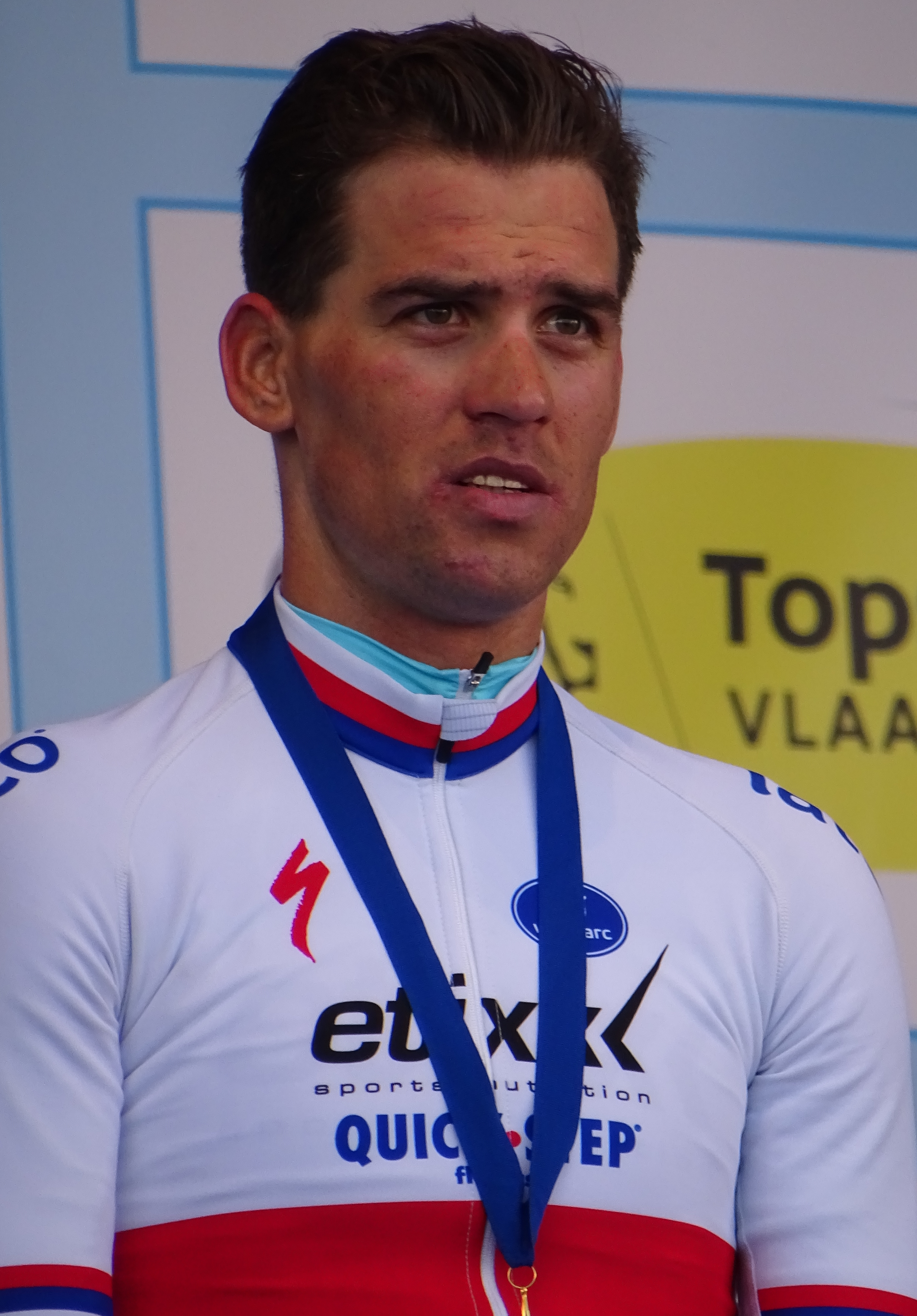 Reportage réalisé le vendredi 27 mars à l'occasion du départ et de l'arrivée du Grand Prix E3 2015 à Harelbeke, Belgique.